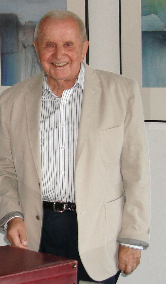 Foto vum Emile Hemmen